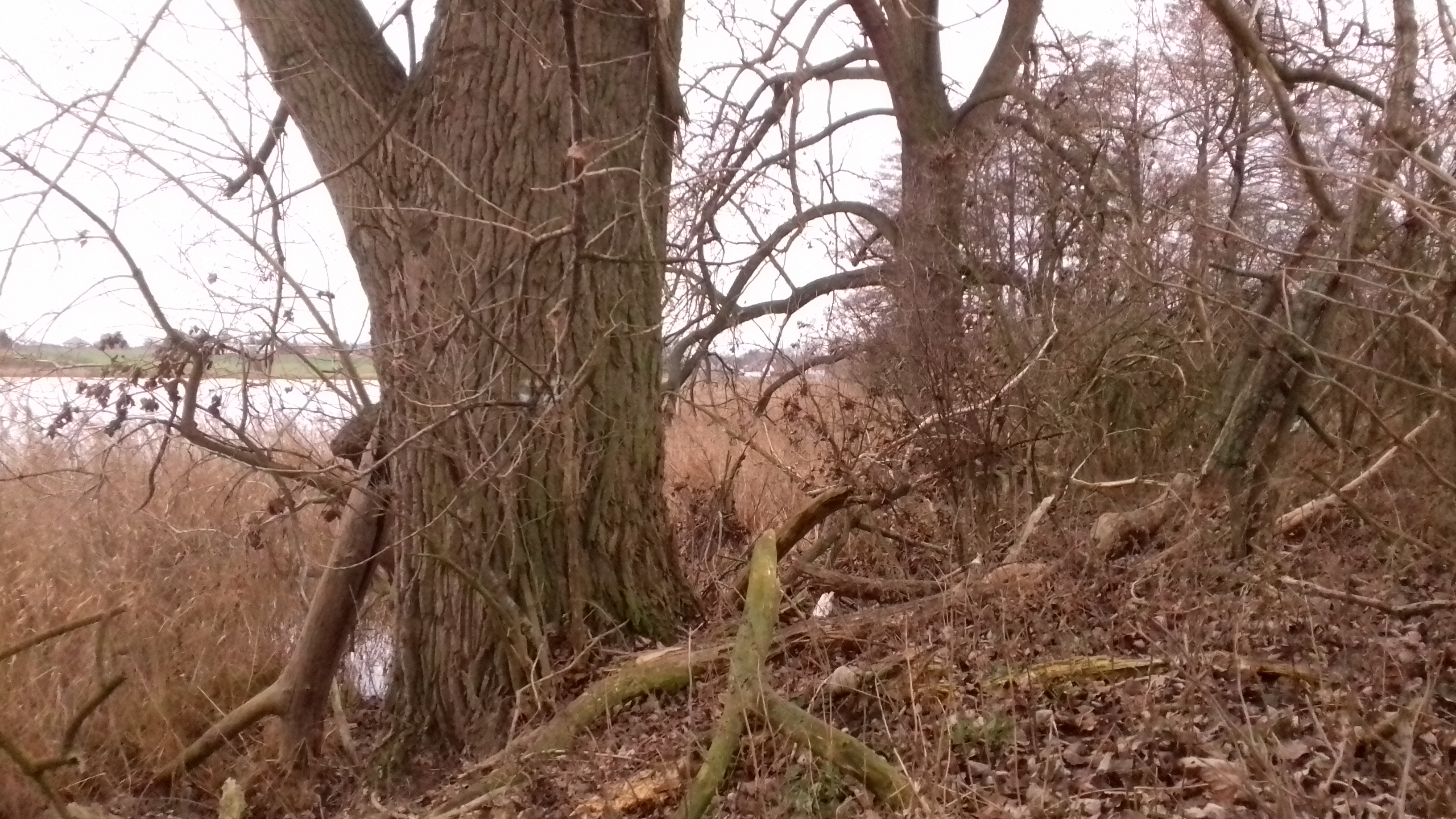 Oznaczenie szlaku pieszego nr 3583 na nieczynnym fragmencie nad brzegiem Jeziora Witobelskiego